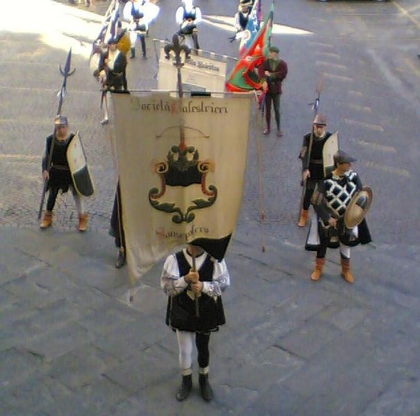 Sansepolcro, provincia di Arezzo, drappo della Società dei Balestrieri